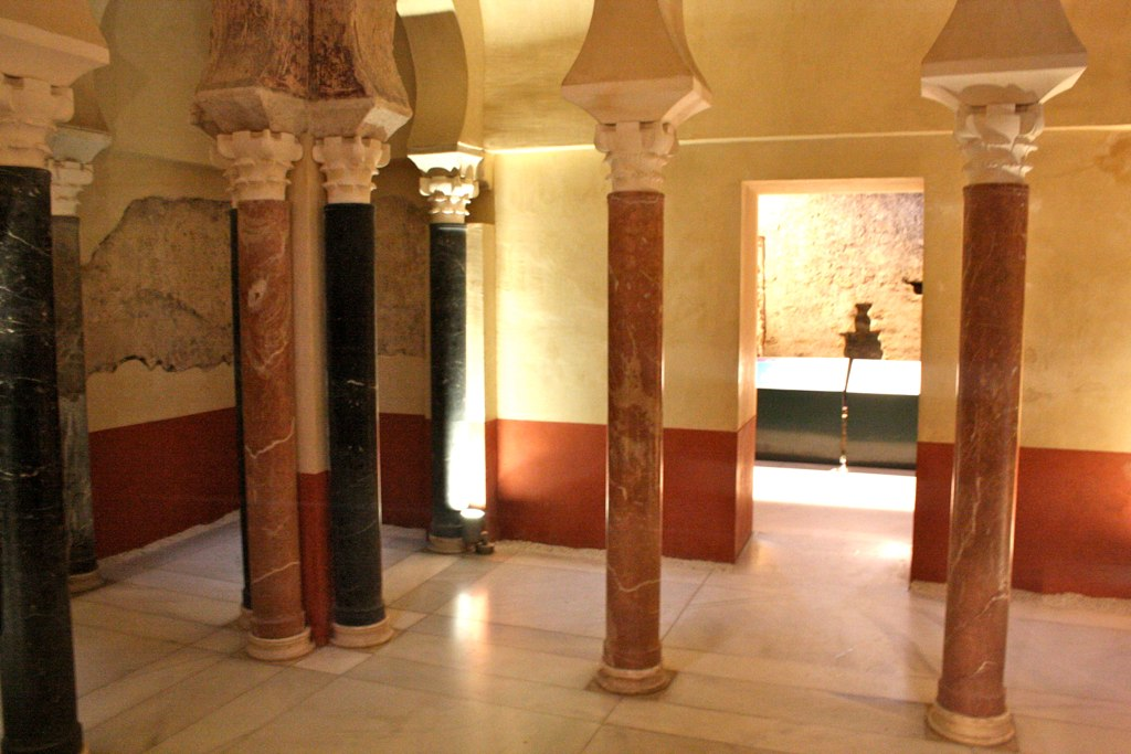 Baños califales en Córdoba (España).